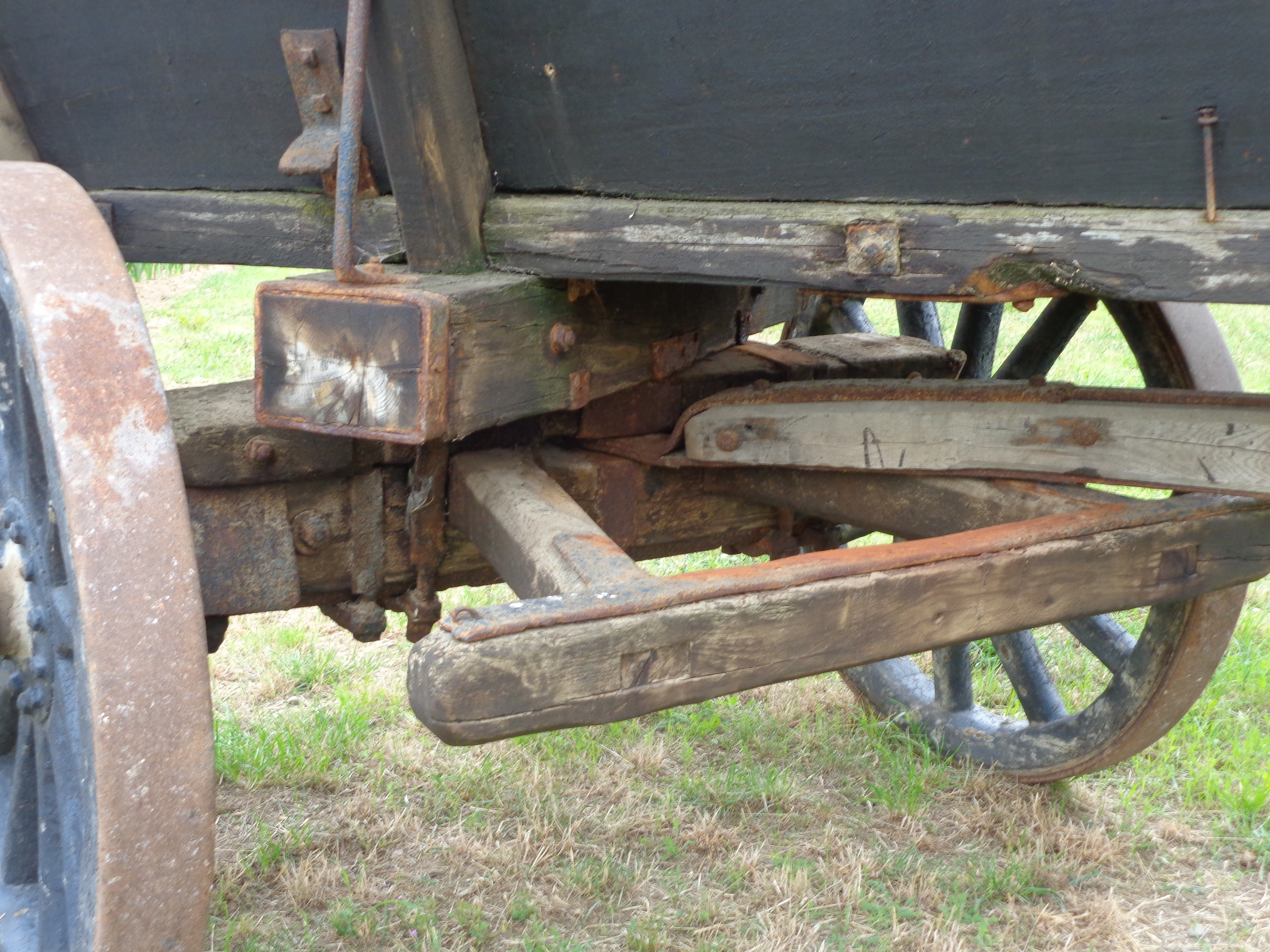 Drehschemel eines Pferdewagens in Quetzin (Plau am See)